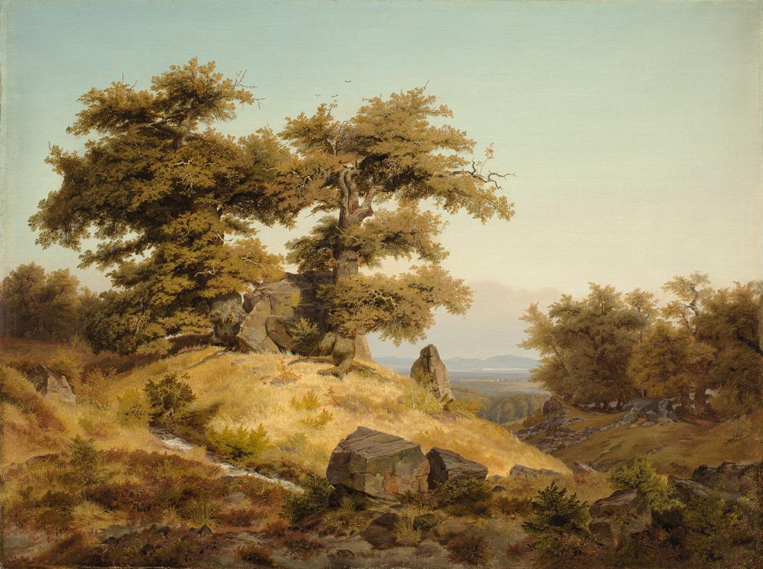 Blick ins Rheintal, Öl auf Leinwand. 60,5 x 81 cm